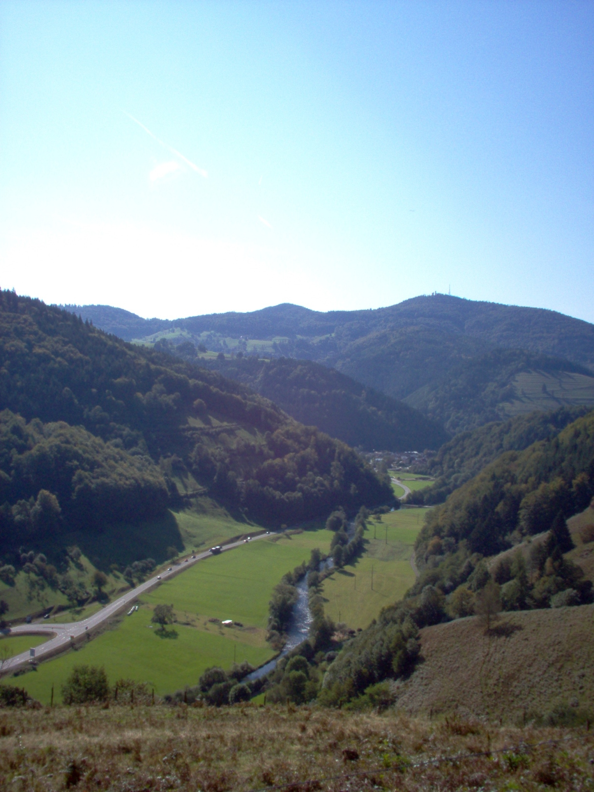 Blick auf das Wiesental oberhalb von Zell im Wiesental